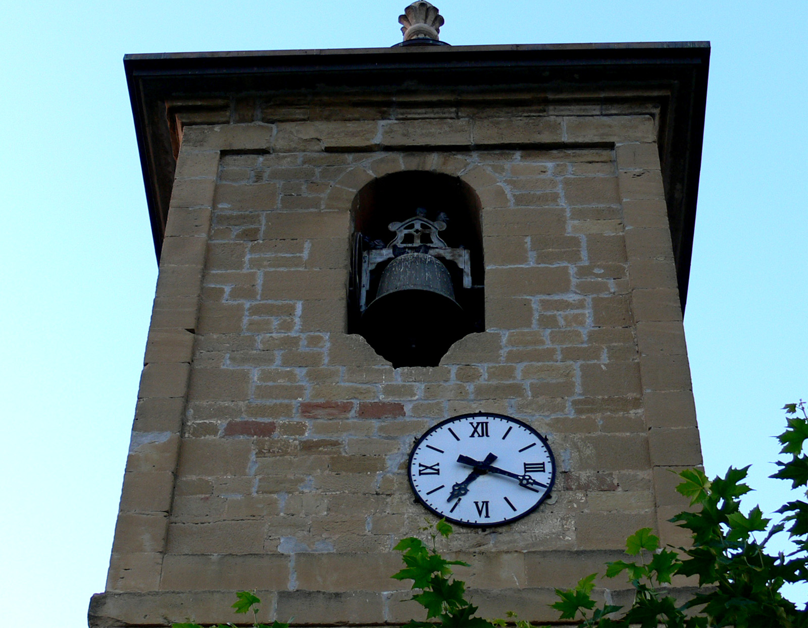 Iglesia de San Juan Bautista en Cihuri, La Rioja - España.